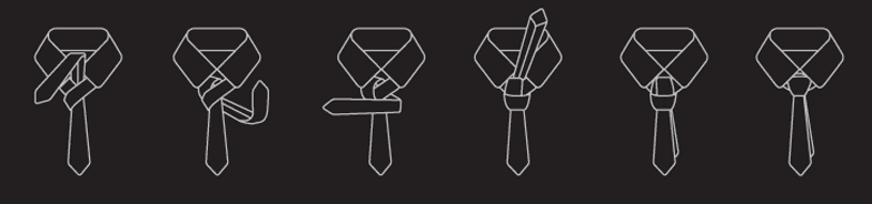 EINFACHER WINDSOR KNOTEN